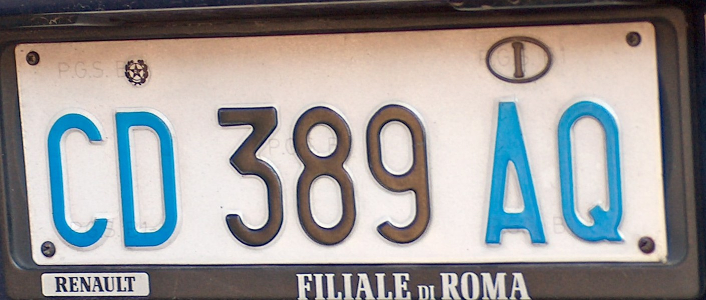 Diplomaten-Kennzeichen aus Italien; Corpo Diplomatico (Diplomatisches Corps); AQ = Frankreich